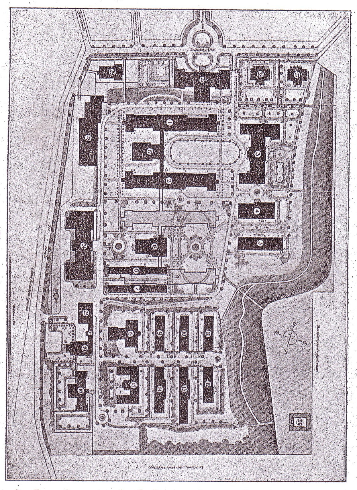 Lageplan des neuen Stadtkrankenhauses Danzig